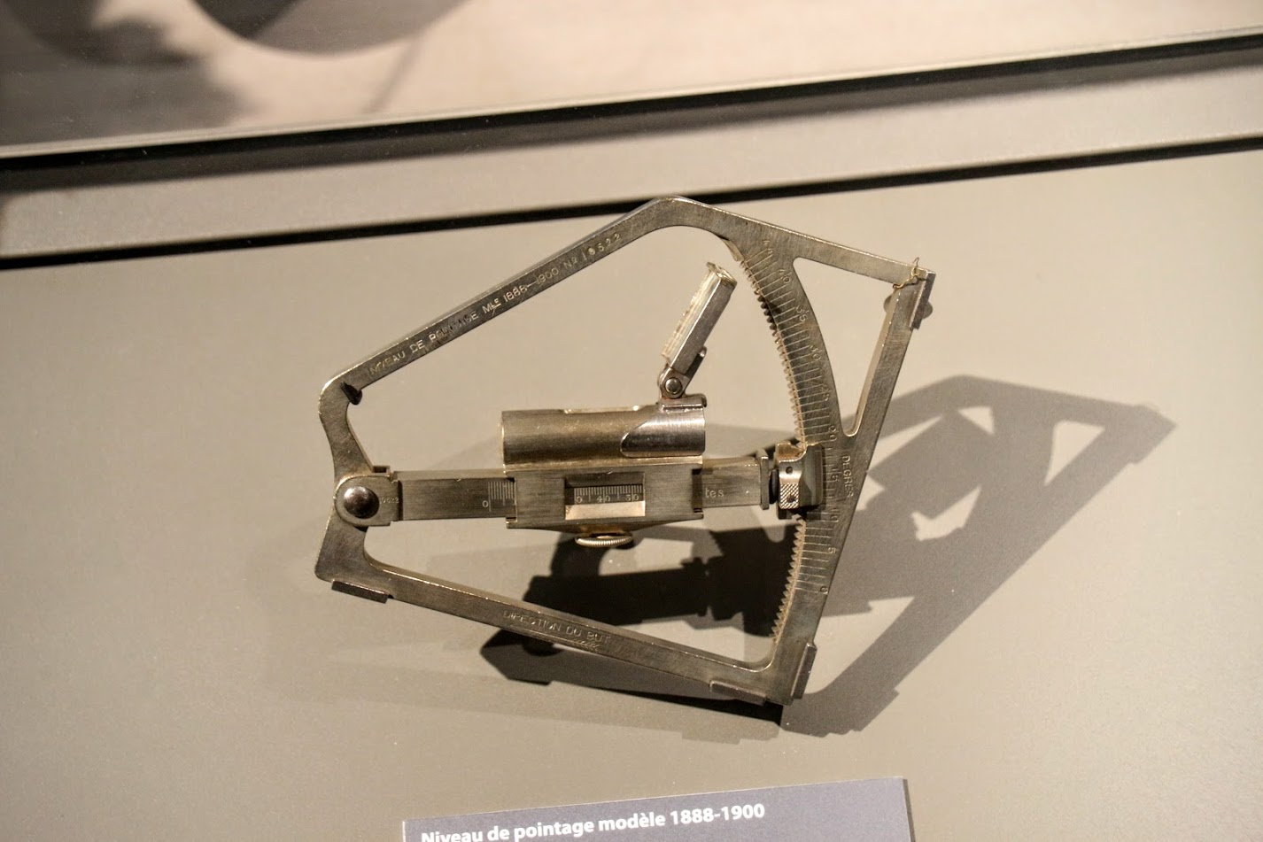 Niveau d'artillerie Mle 1890-1900 réglementaire, destiné à mesurer l'angle du tube d'un canon pour déterminer la portée.